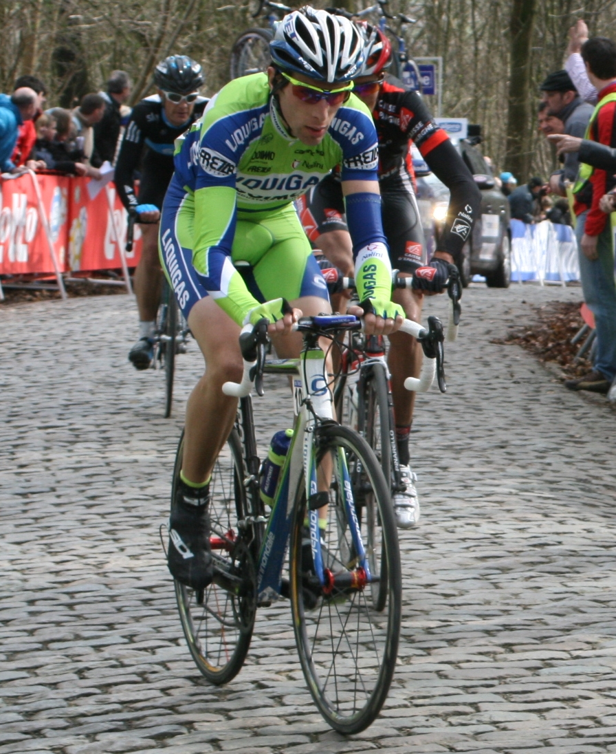 Tiziano Dall'Antonia dans la deuxième ascension du mont Kemmel lors de Gand-Wevelgem 2010